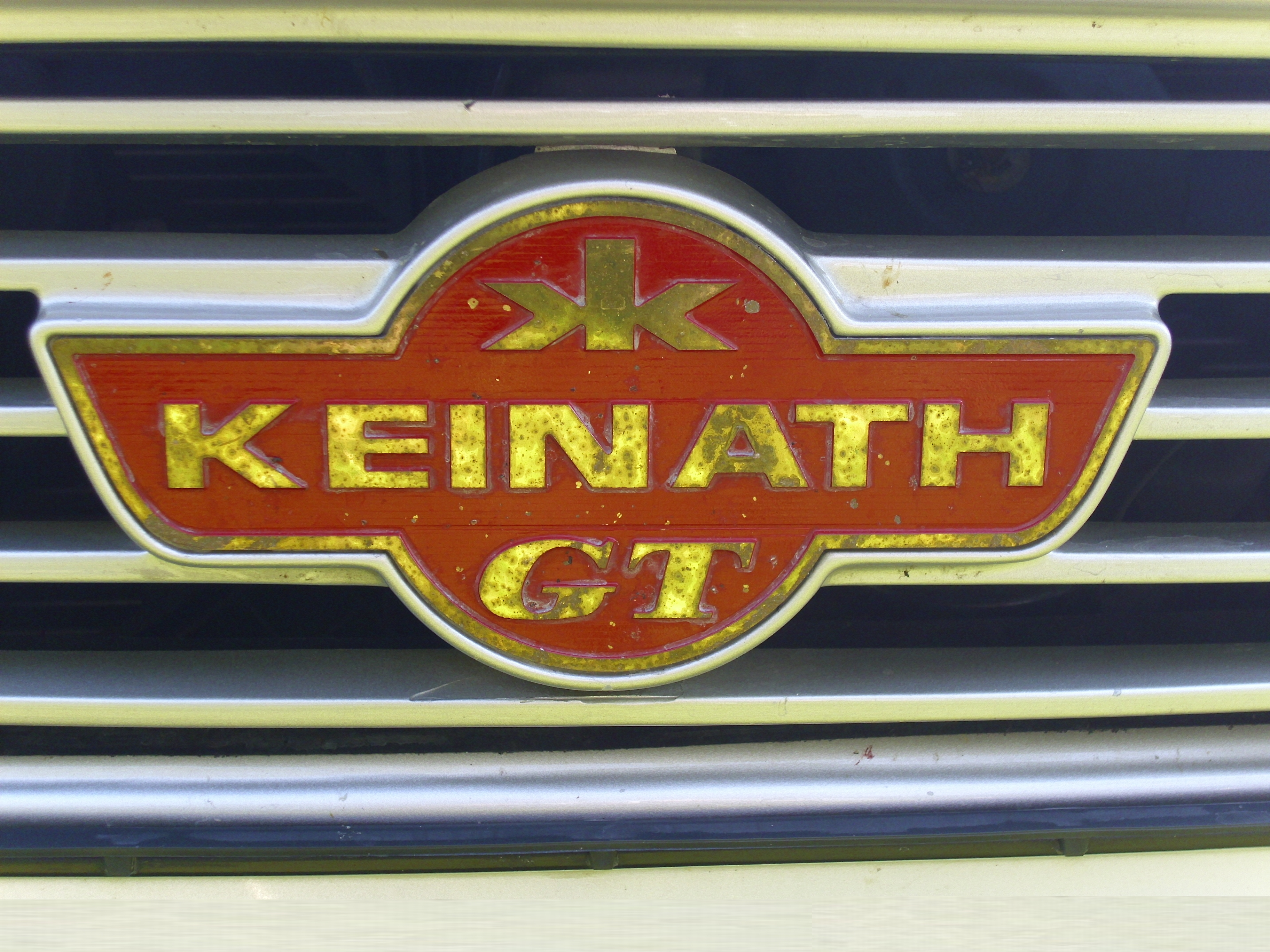 Emblem Keinath